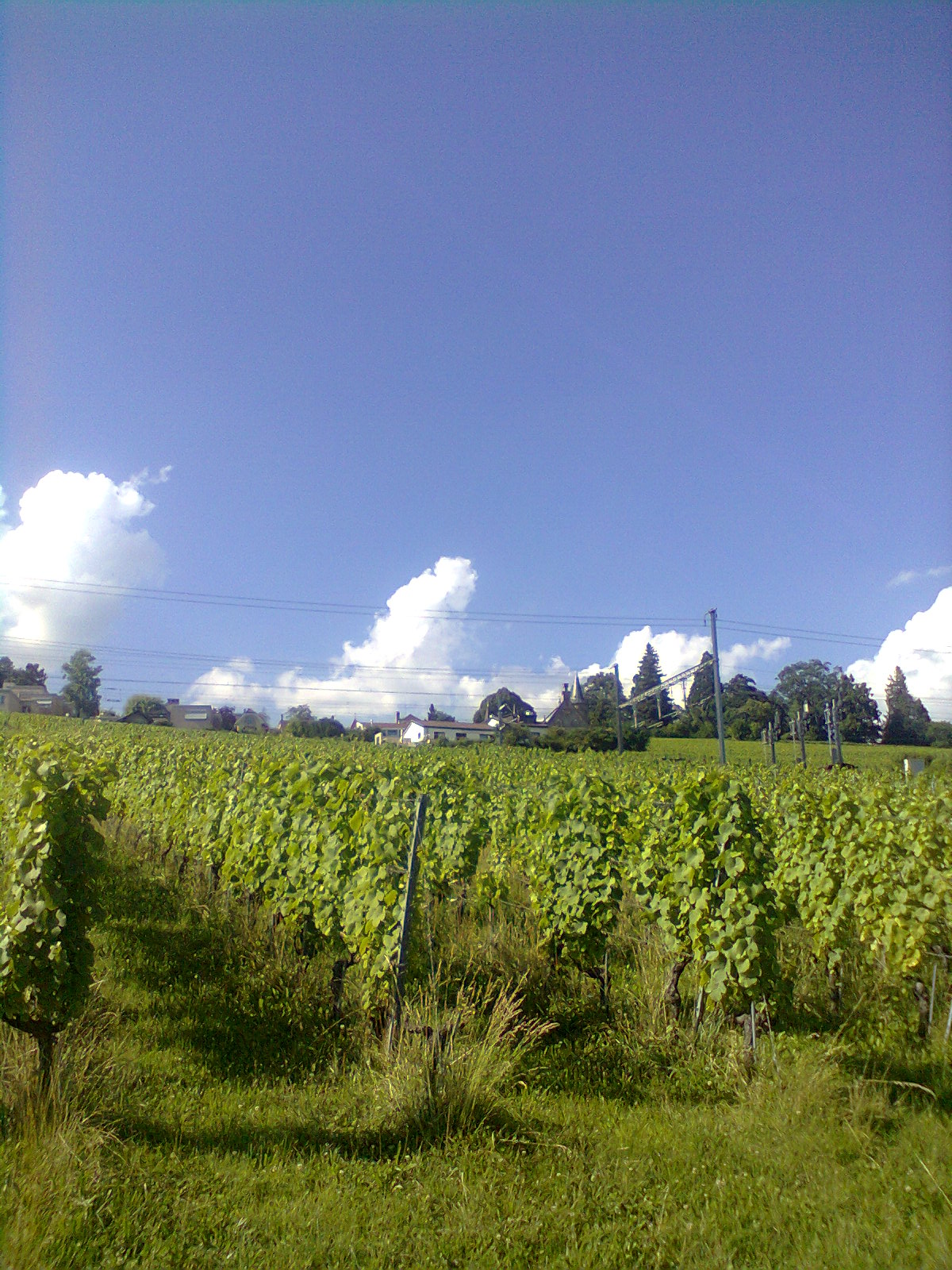 Corcelles des vignes